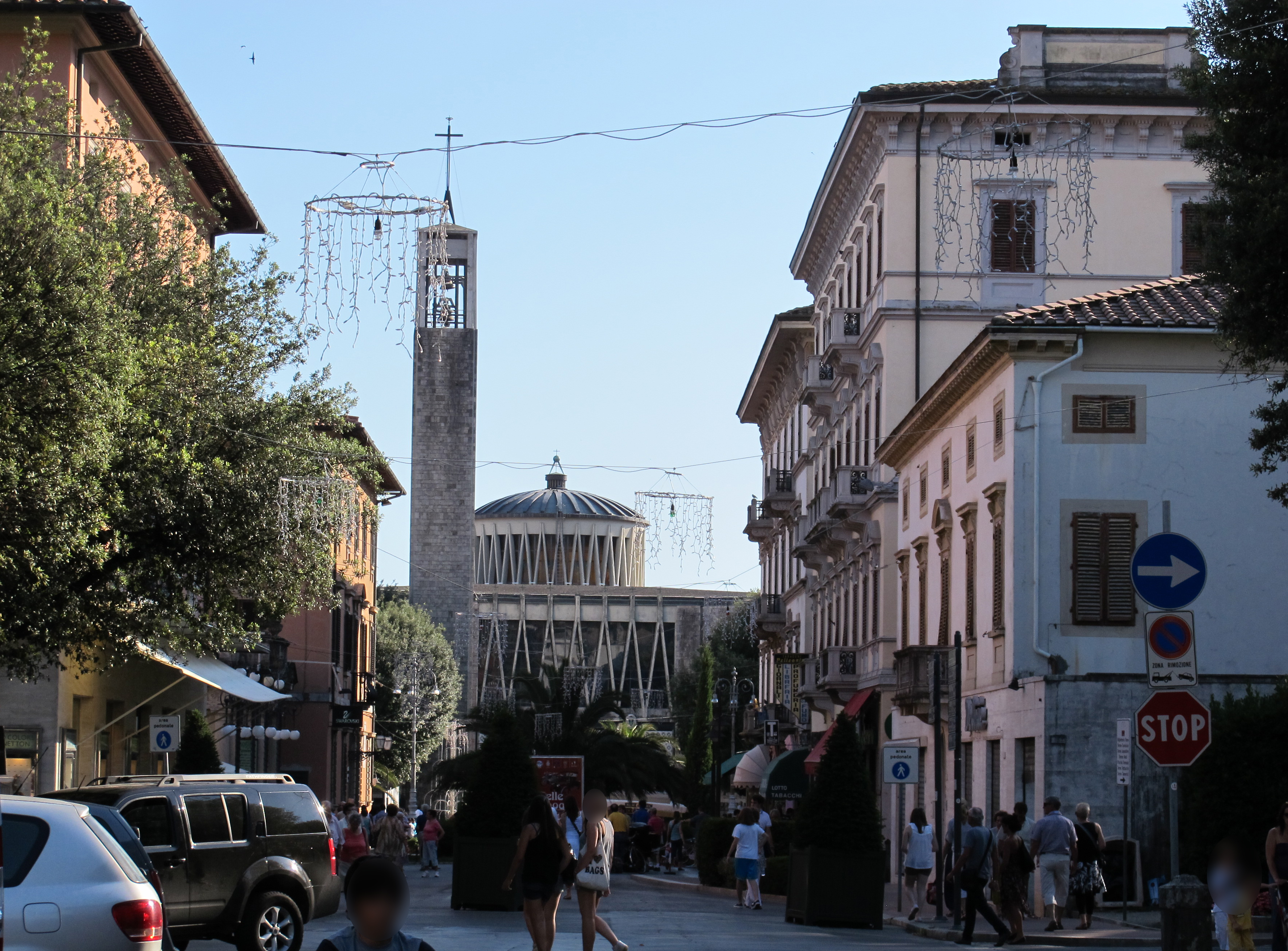 Montecatini, via verdi 3